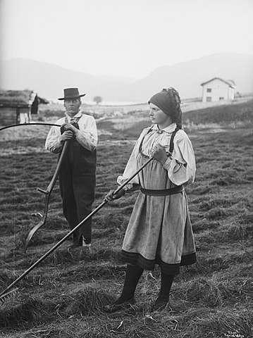 Possering for fotografen under slåttonna på Øvre Kvåle i Bygland